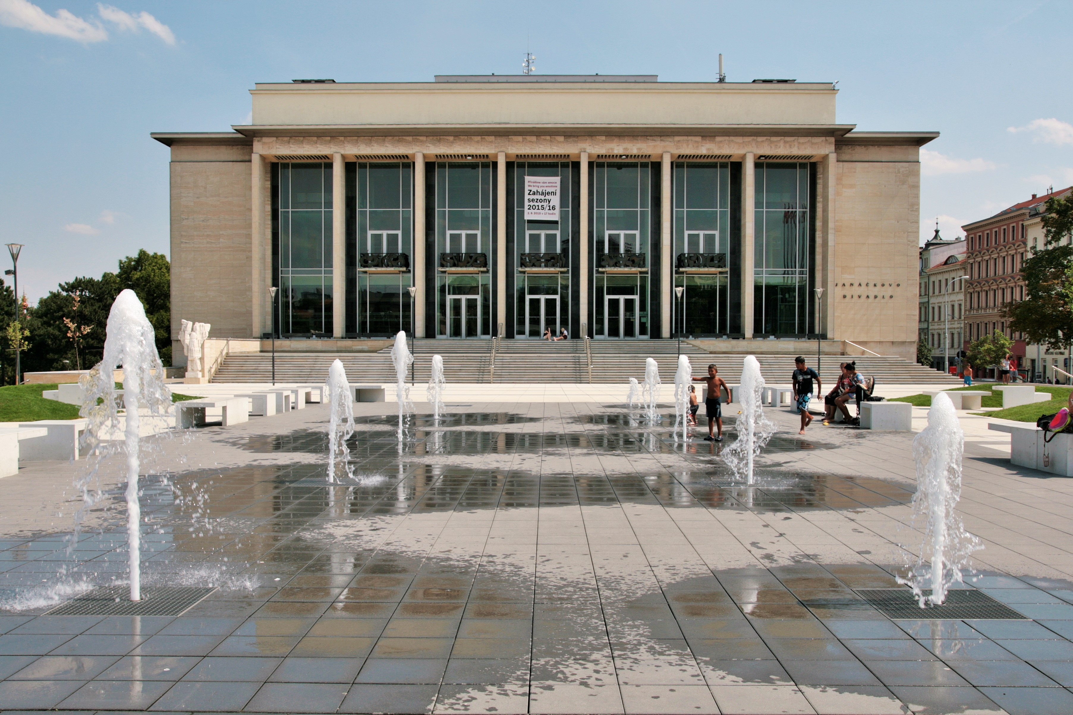 Park Koliště, rekreační plocha na střeše podzemních garáží před Janáčkovým divadlem, Rooseveltova 711/3, Brno.